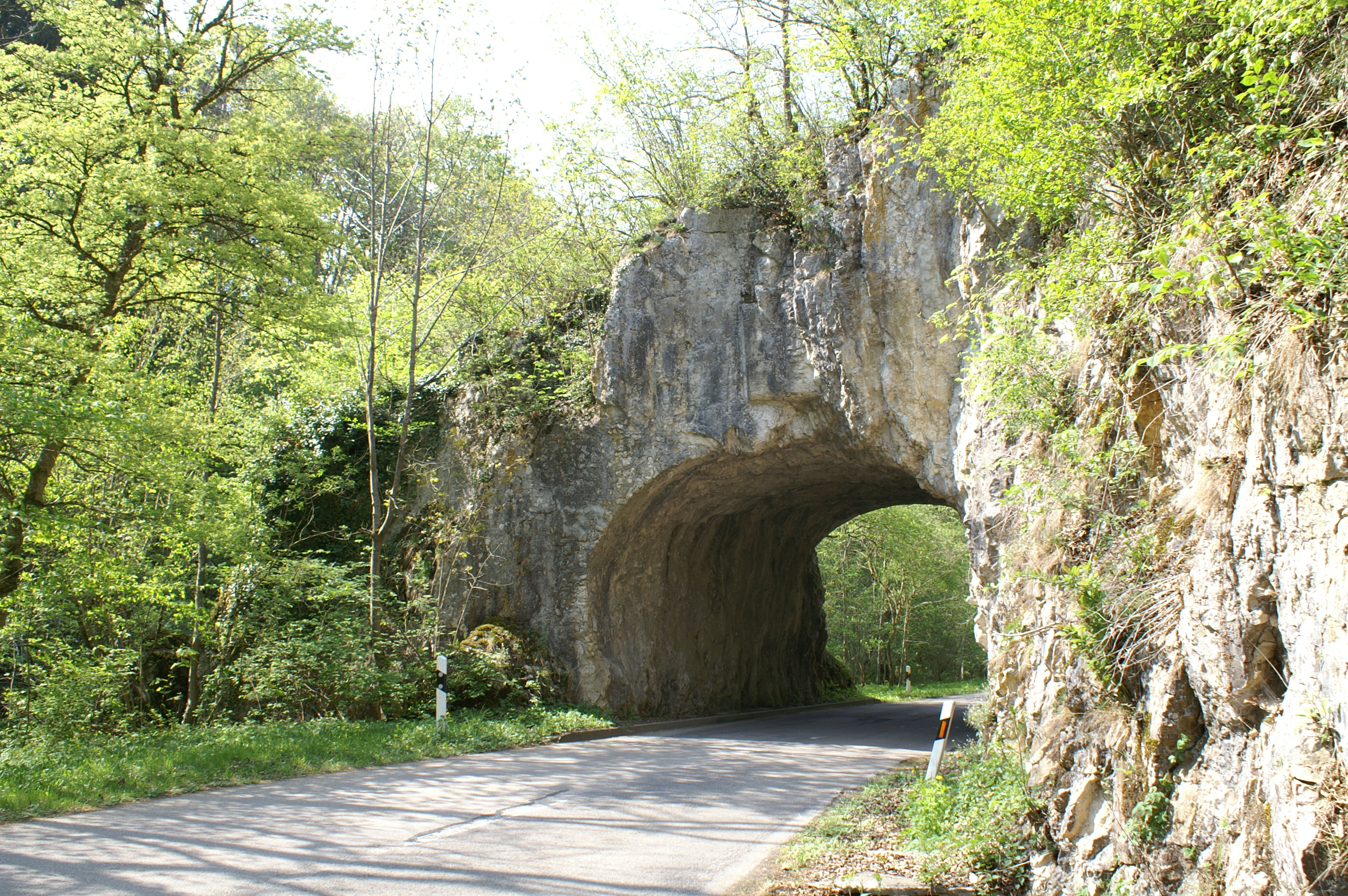 Die Straße von Lauterach ins Wolfstal führt durch diesen kleinen in den Fels gehauenen Tunnel.